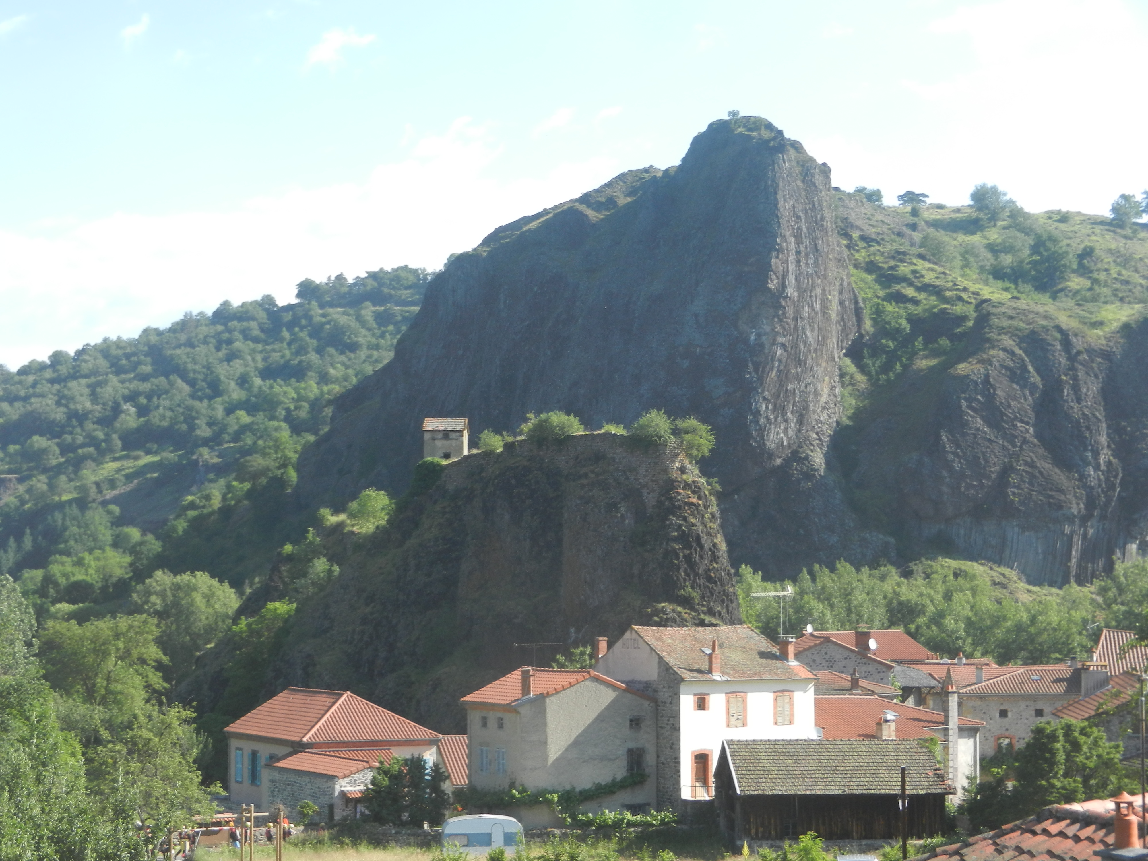 Gorges de l'Allier : le grand tertre basaltique vers Arcons-d'Allier